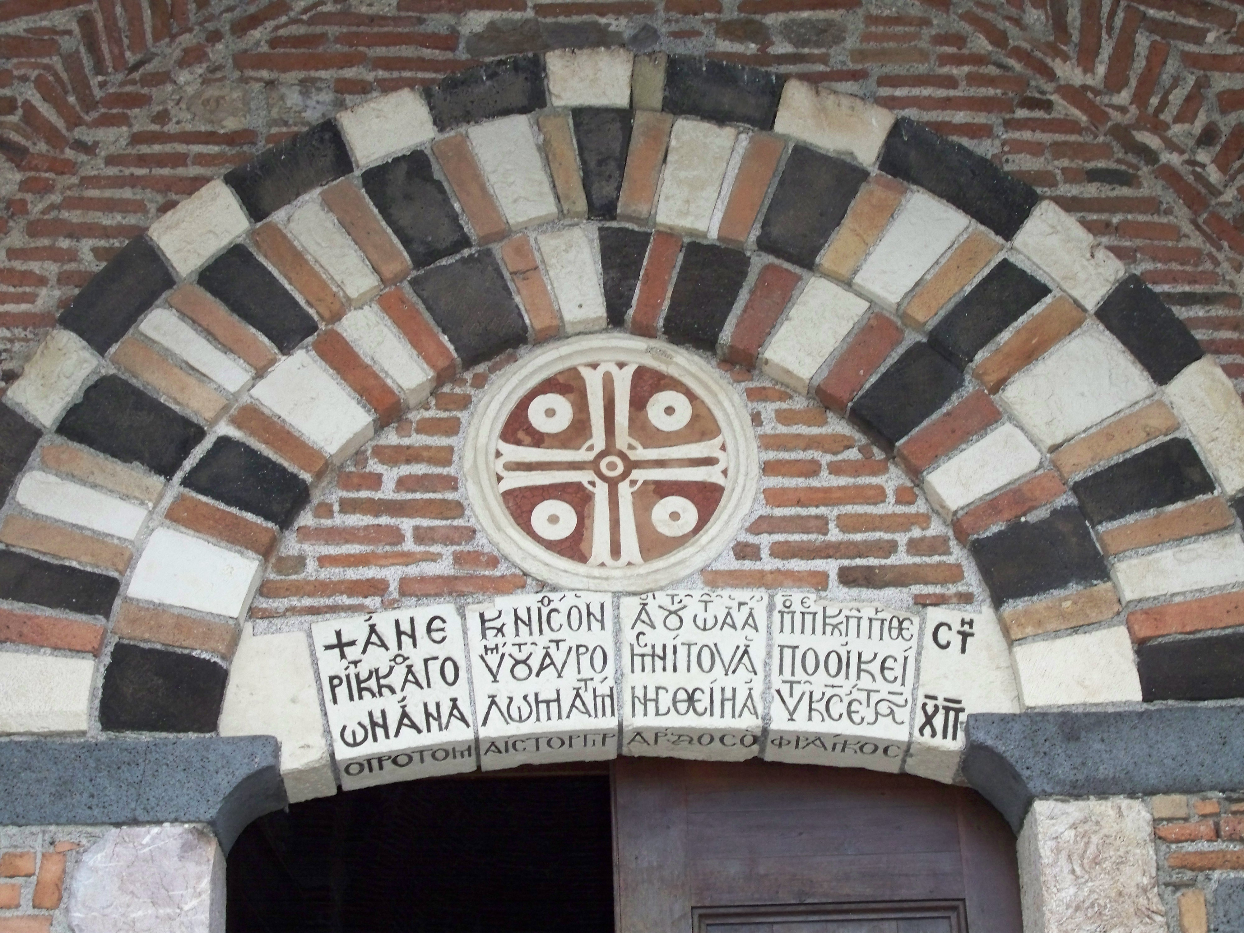 Architrave della chiesa SS Pietro e Paolo d'Agrò a Casalvecchio Siculo (Me)